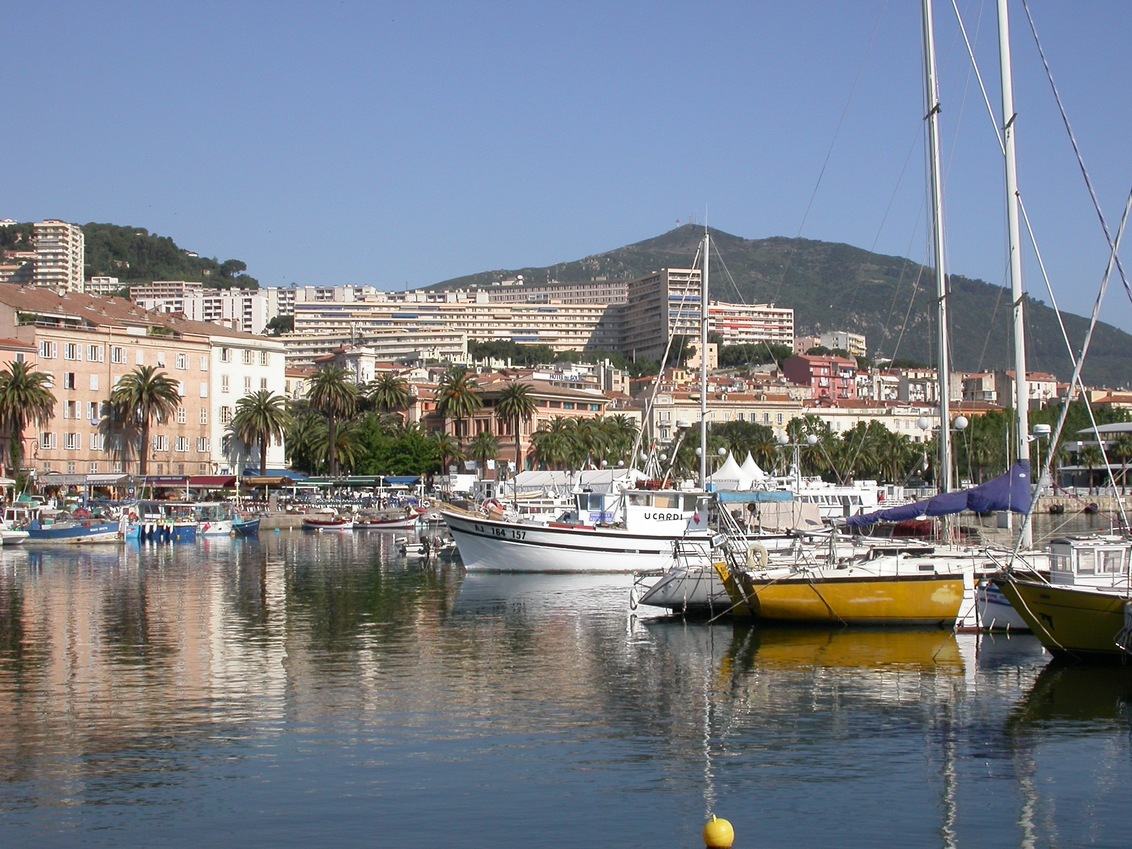 Port D'Ajaccio